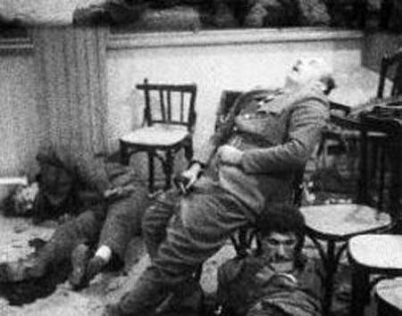 Arabic: صوره جثث عبد الكريم قاسم وقيادات حكومته المنحلة